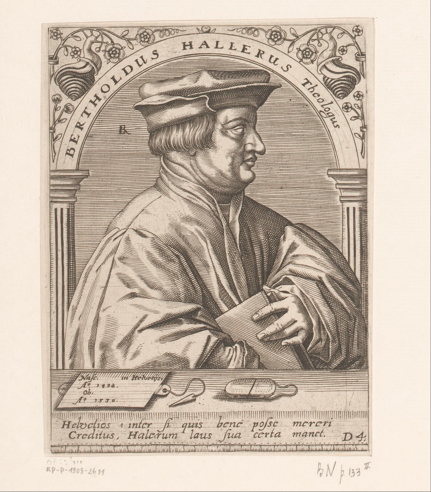 IdentificatieTitel(s): Portret van Berchtold HallerBertholdus Hallerus Theologus (titel op object)Serie portretten van vijftiende- en zestiende-eeuwse geleerden (serietitel)Objecttype: prent Objectnummer: RP-P-1908-2611Opschriften / Merken: verzamelaarsmerk, verso, gestempeld: Lugt 2228Omschrijving: Rechtsonder genummerd D4.VervaardigingVervaardiger: prentmaker: Robert Boissard (vermeld op object)prentmaker: Johann Theodor de Bry (verworpen toeschrijving)Plaats vervaardiging: FrankrijkDatering: 1597 - 1599Materiaal: papier Techniek: graveren (drukprocedé)Afmetingen: blad: h 144 mm (Binnen plaatrand afgesneden.)plaatrand: b 107 mmToelichtingMogelijk prent uit: Boissard, Jean-Jacques; Bry, Theodoor de; e.a. Bibliotheca sive thesaurus virtutis et gloriae in quo continentur illustrium eruditione et doctrina virorum effigies et vitae (...). Frankfurt: Guilielmi Fitzeri, 1628.OnderwerpWat: historical personsbookmolluscs: snailWie: Berchtold HallerVerwerving en rechtenVerwerving: aankoop 1905Copyright: Publiek domein